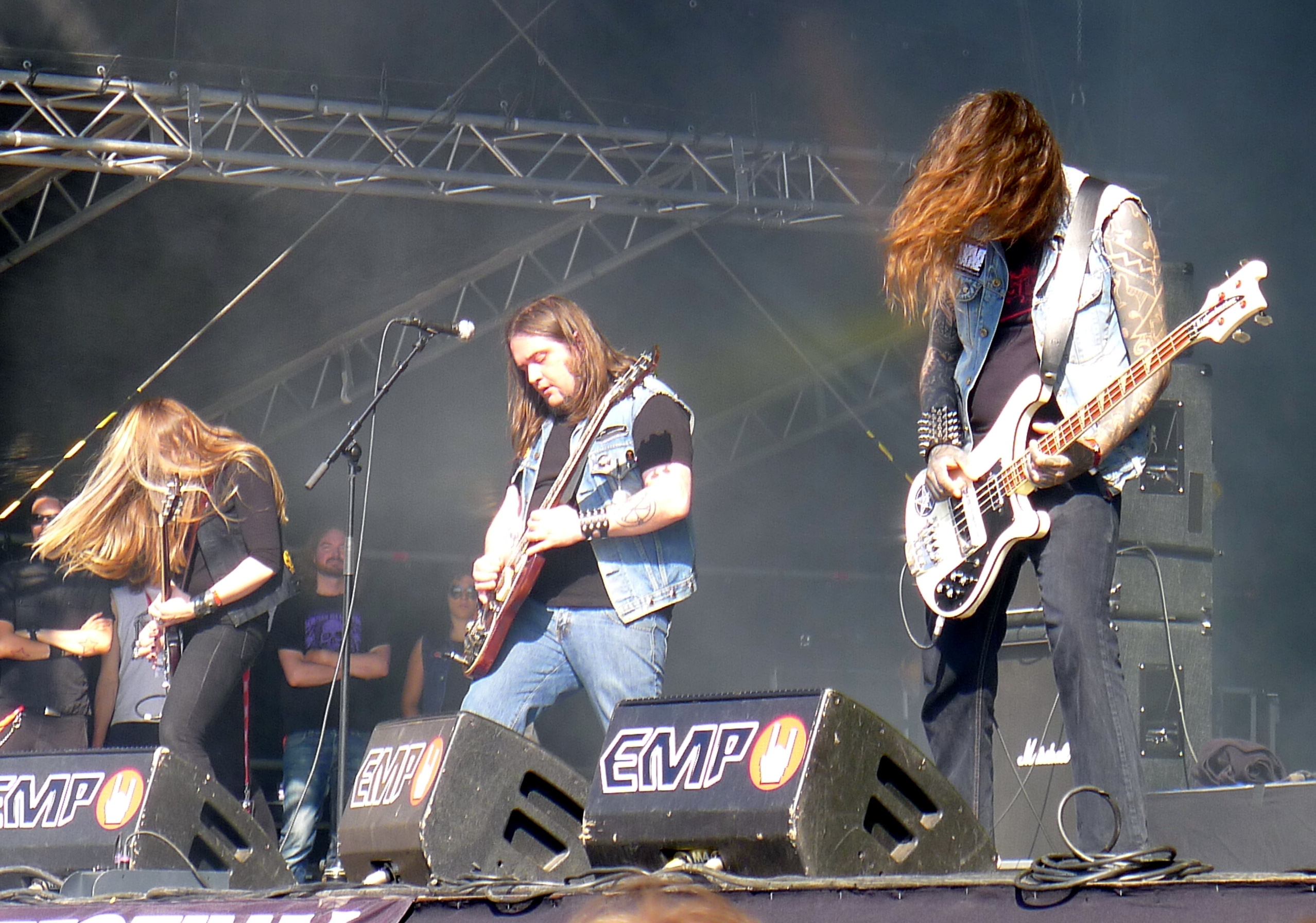 Electric Wizard live am Tuska Open Air 2011